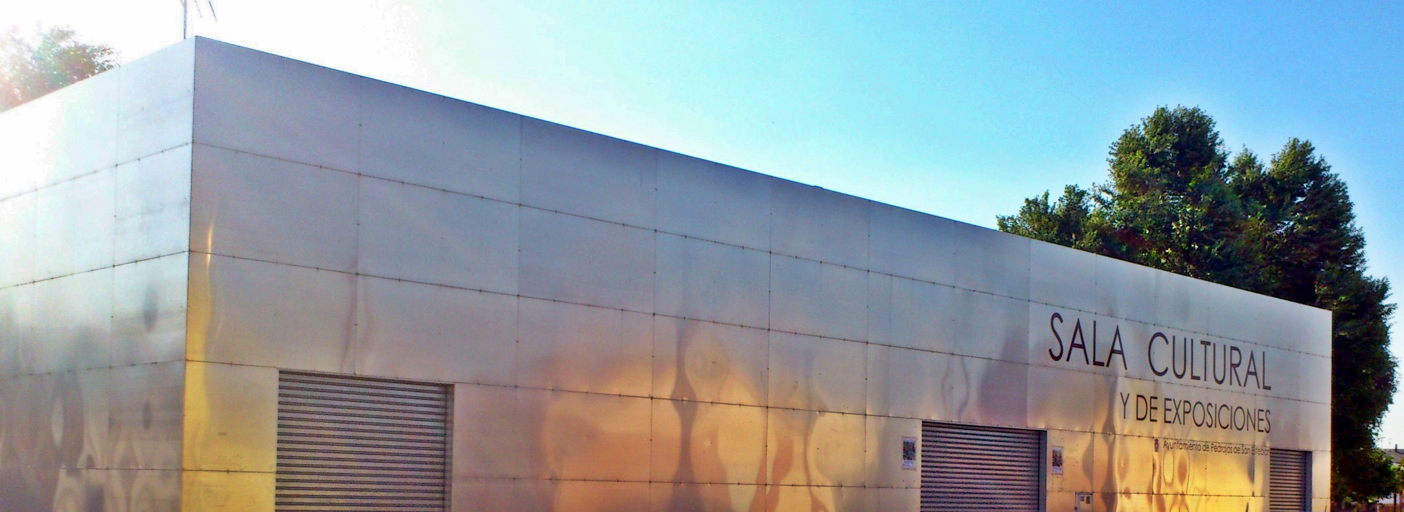 Sala de Exposiciones. Pedrajas de San Esteban (Valladolid).